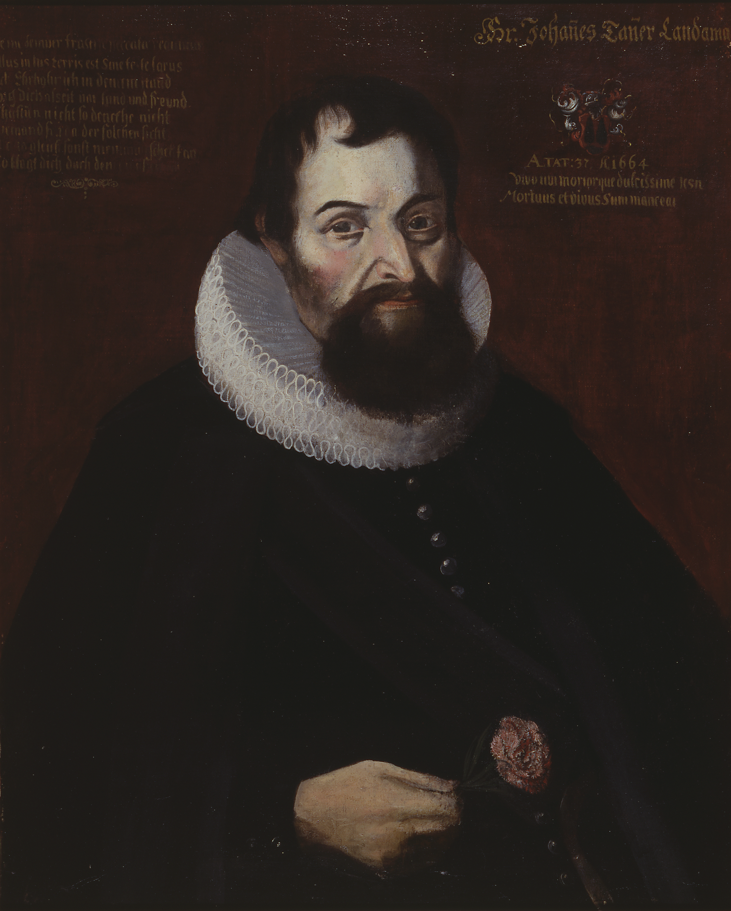 10. Landammann von Appenzell Ausserrhoden, Brustbildnis